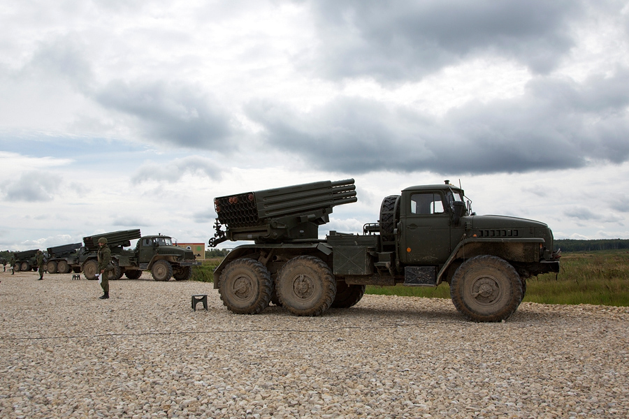 Полевые занятия 147-го гвардейского самоходного артиллерийского полка 2-й гвардейской мотострелковой дивизии (полигон Алабино, Московская область).